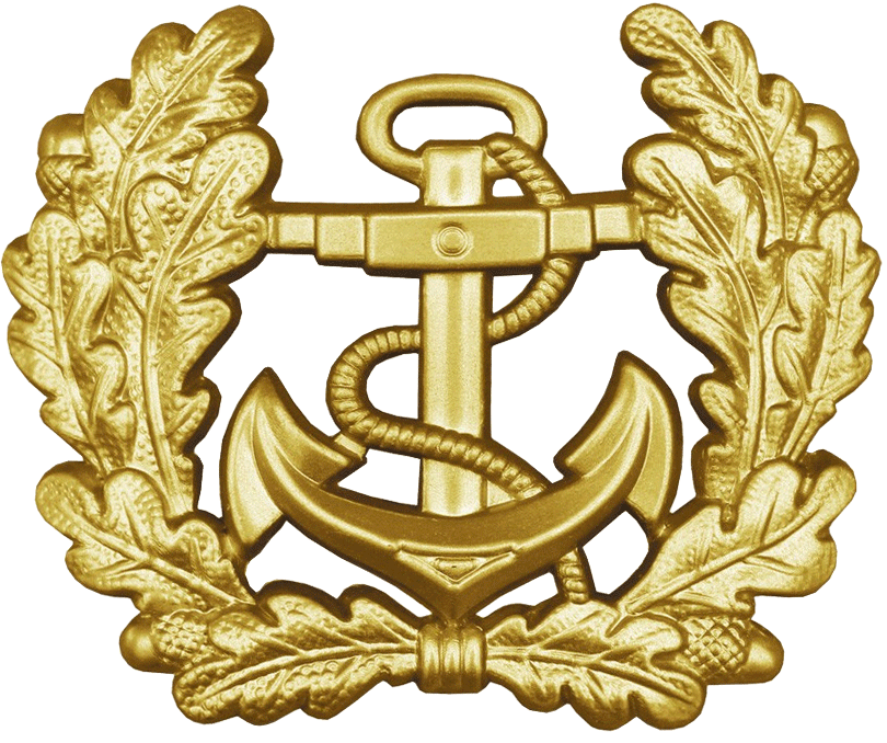 Abzeichen für die Dienstmütze der Bundeswehr für Offiziere und Oberfähnriche der Marine Beschreibung: Anker mit Eichenlaubumrandung Mützenfarbe: weiß Trageweise: Über der Mitte des Mützenschirms, Unterkante des Abzeichens über dem Kinnband. Maße: Breit: 55 mm Hoch: 45mm Ausführung: goldfarben, Metall